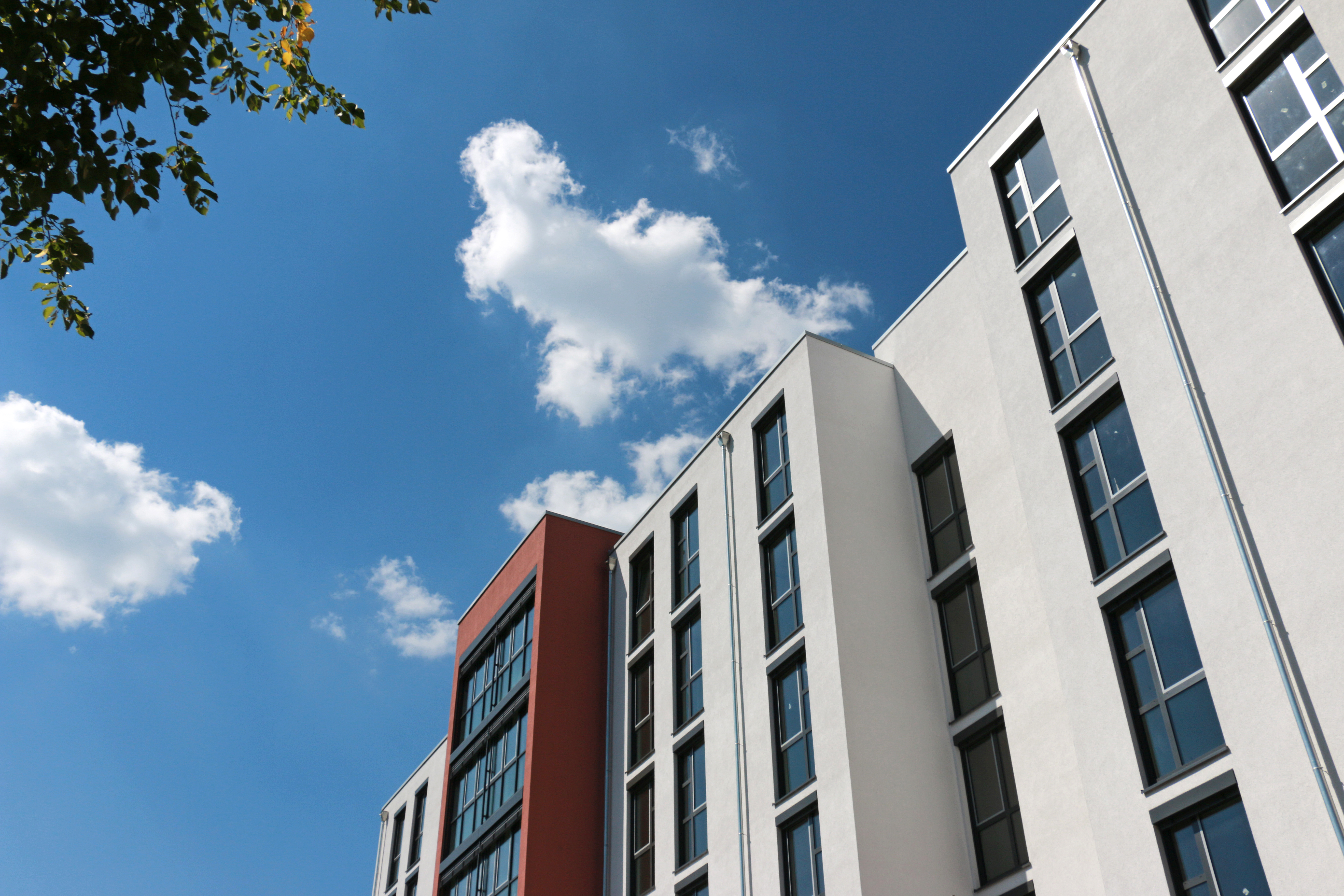 Das Erweiterungsgebäude